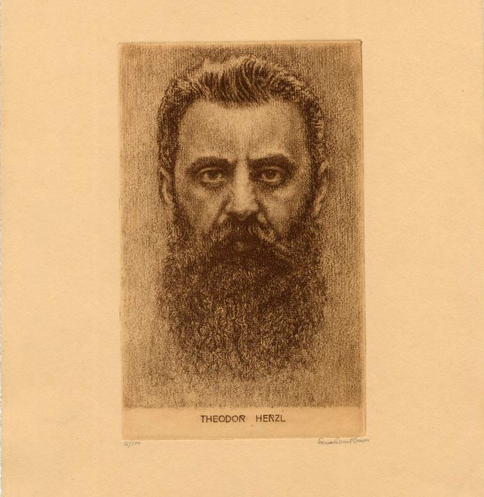 Emma Löwenstamm (1879—1941). Theodor Herzl. Židovské muzeum v Praze, inventární číslo: 073.127